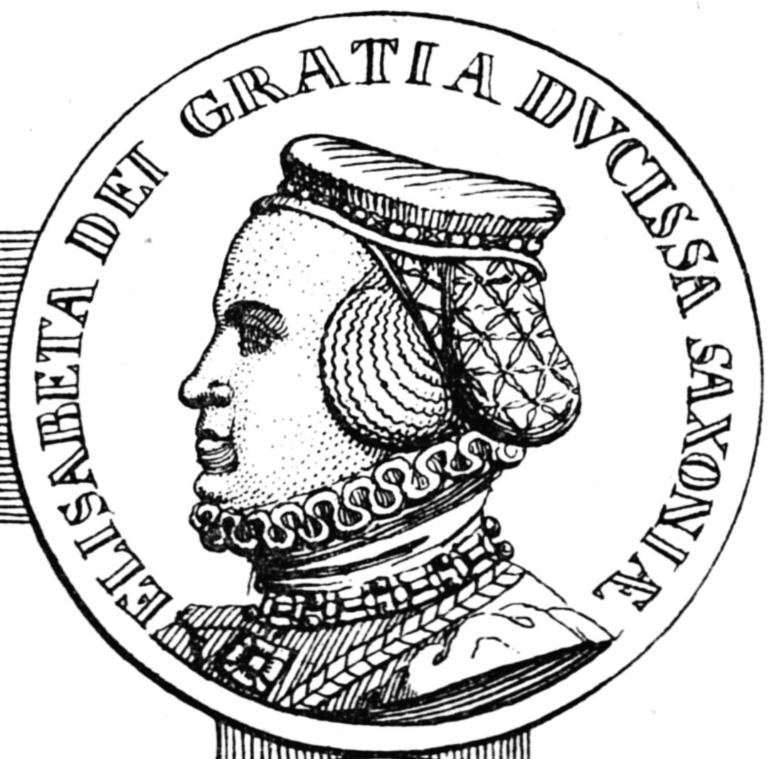 links: Medaille des Herzogs Johann Friedrich des Mittleren mit der Umschrift: Dux Iohannes Fridericus captivus - auf der Rückseite das Herzoglich sächsische Wappen. rechts: Medaille seiner Gattin Elisabeth, einer geborenenn Pfalzgräfin vom Rhein - auf der Rückseite ihr vaterländisches Wappen mit darauf gelegtem sächsischen Wappen. Nach Tentzel: Saxonia numismatica oder Sächsisches-Medaillencabinet. (Ernestinische Linie.) Dresden 1714.